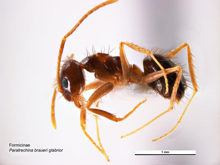 Nylanderia braueri glabrior